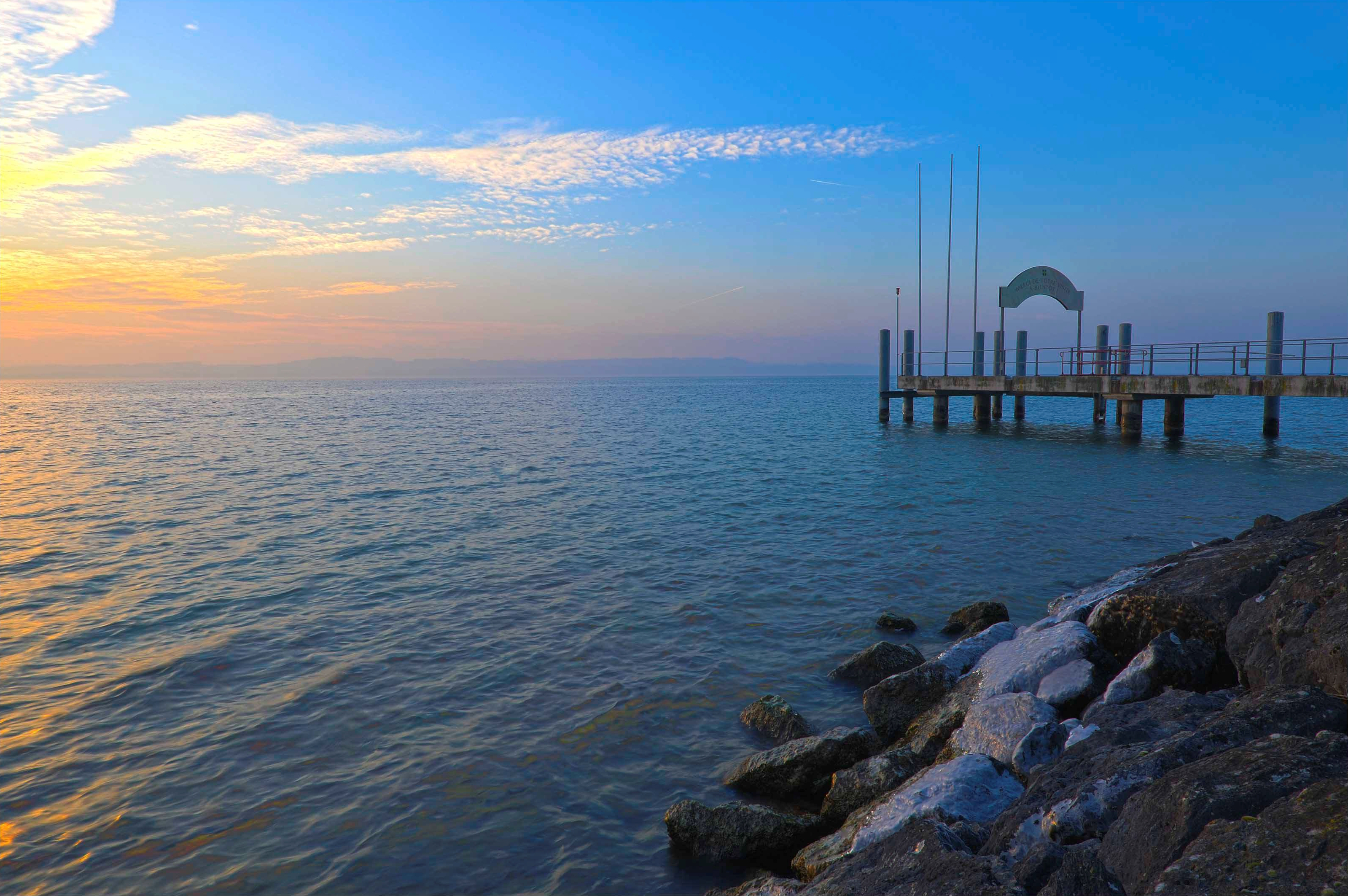 Hauterive, Laténium